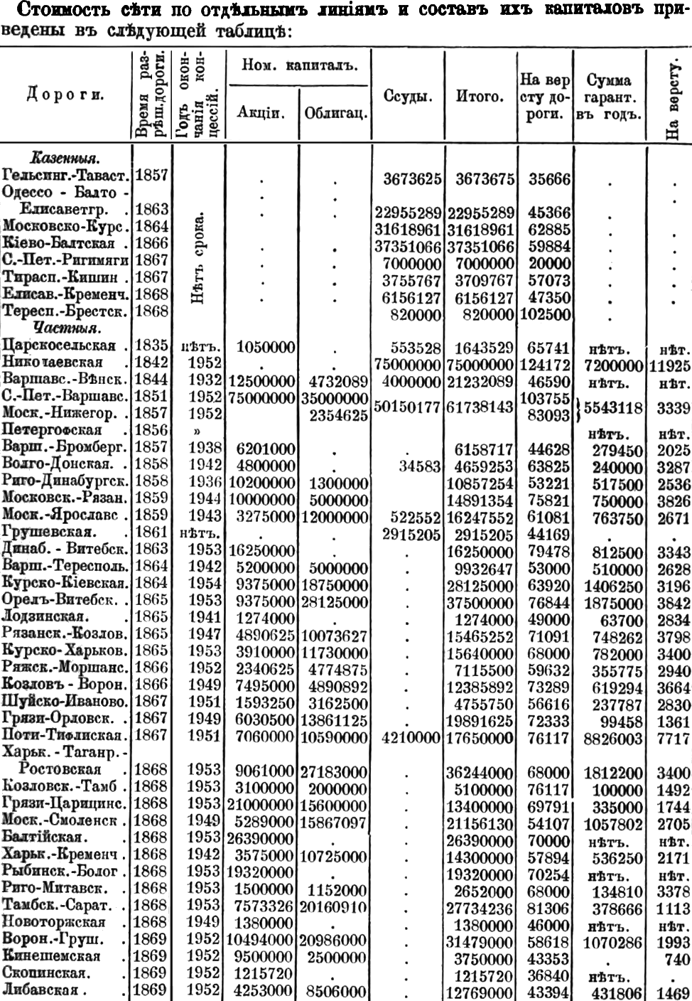 Сводные данные об источниках финансирования строительства железных дорог в Российской империи по состоянию на начало 1870 года («Военно-статистический сборник», вып. IV, 1877, с. 507). Исправлены опечатки: заголовок столбца 1 ("Дороги" вместо "Губернiи"), 1952 год вместо 1592? Источник